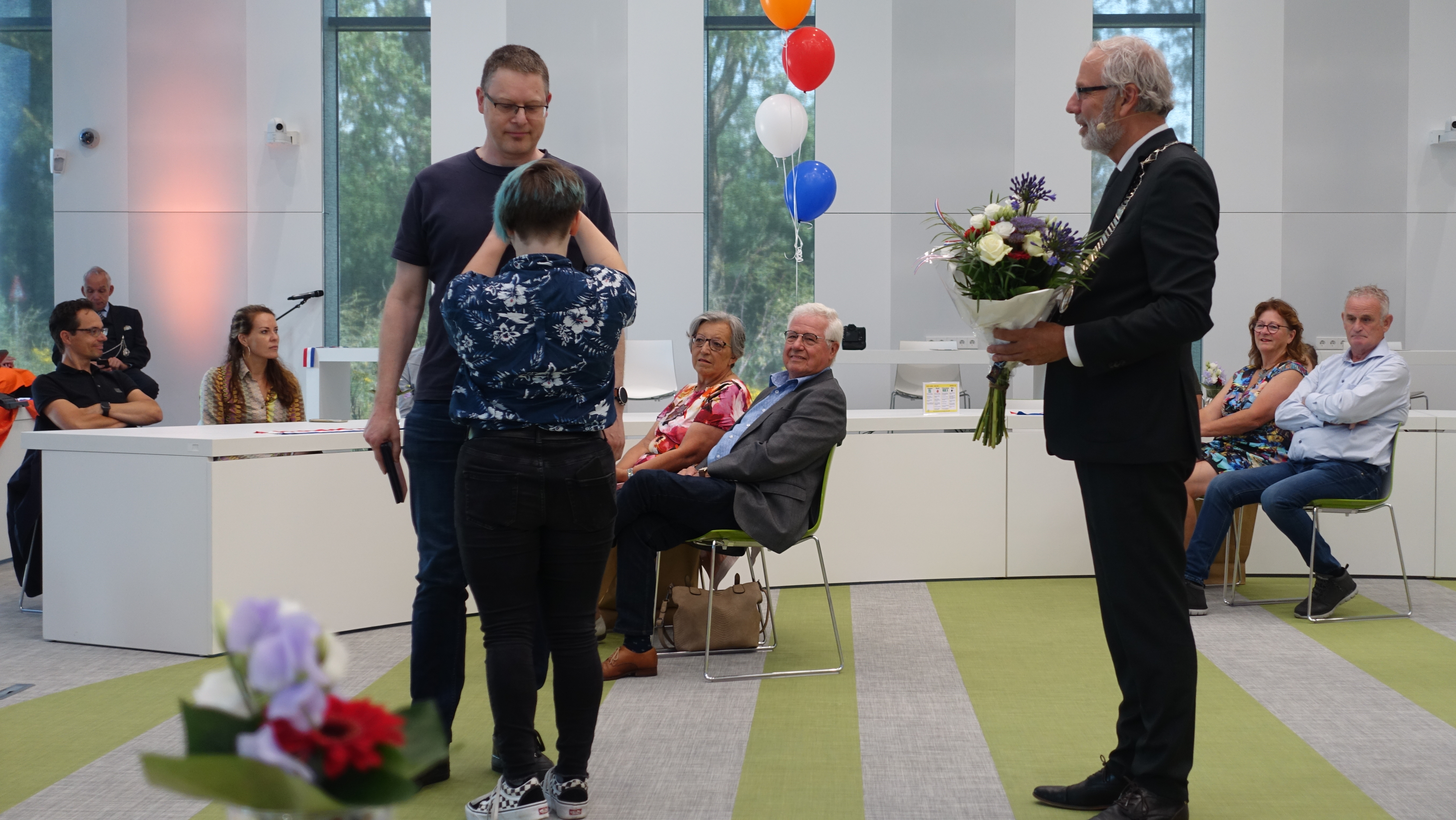 Uitreiking koninklijke onderscheiding Woerden - Edo de Roo krijgt decoratie opgespeld, vanwege de corona pandemie door zijn dochter. Rechts burgemeester Molkenboer